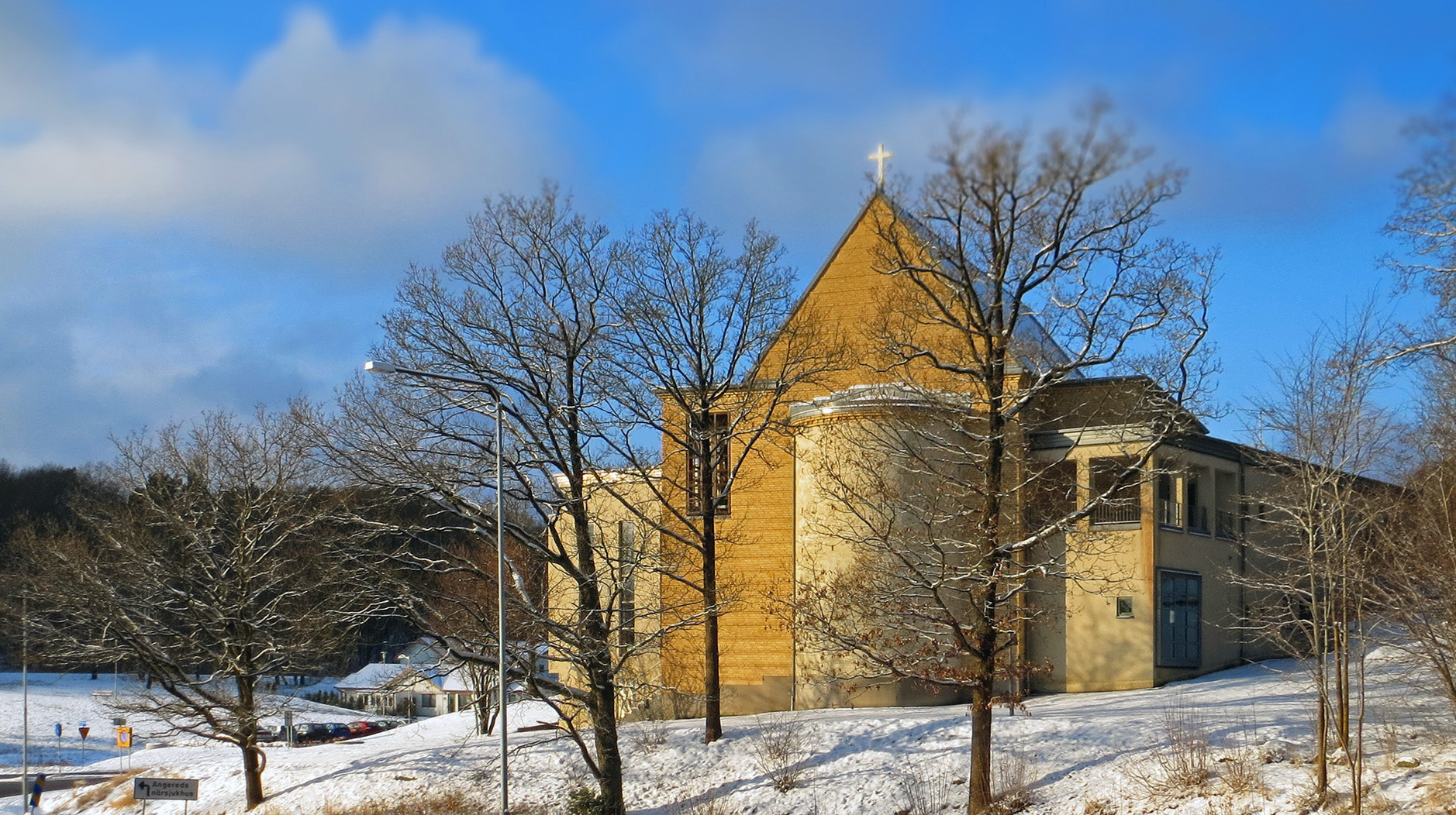 Gunnareds församling i Angered. Göteborg